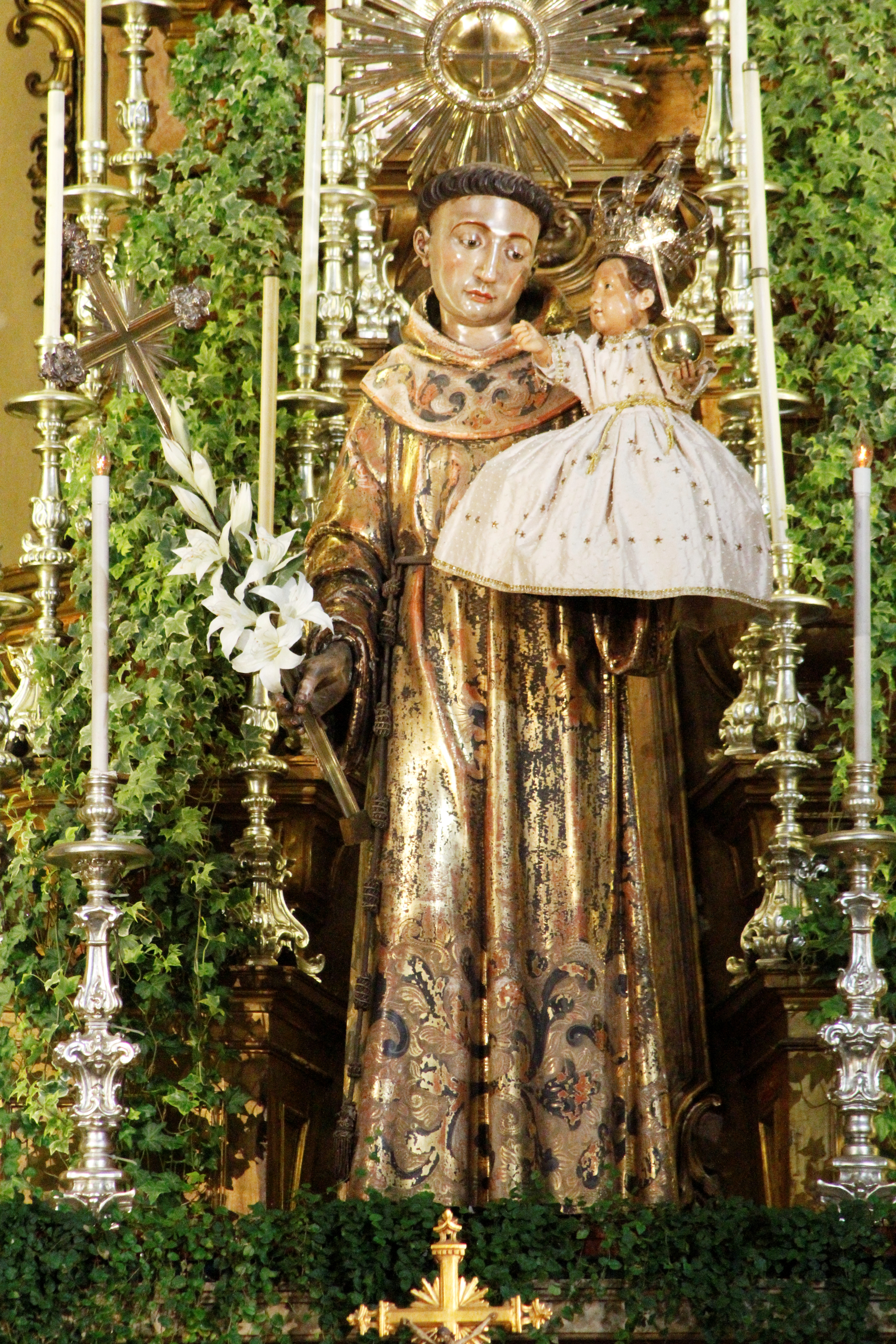 Santo Antônio de Lisboa no altar-mor